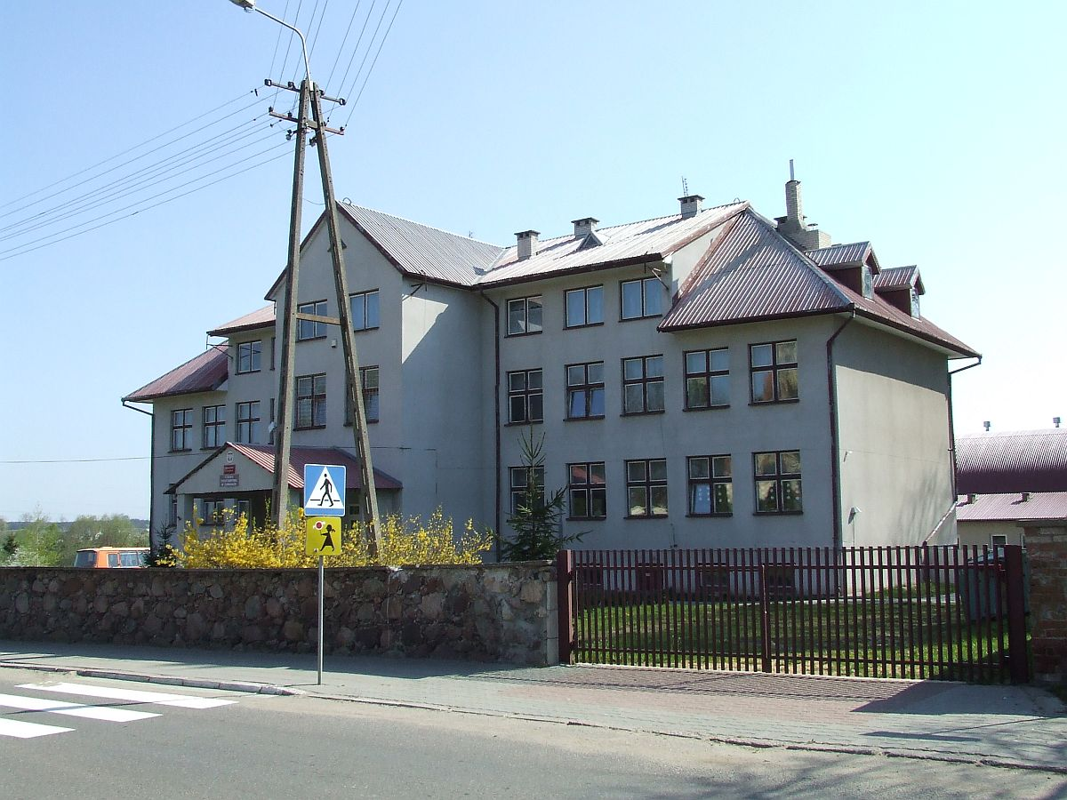 Zawady (gmina Zawady)